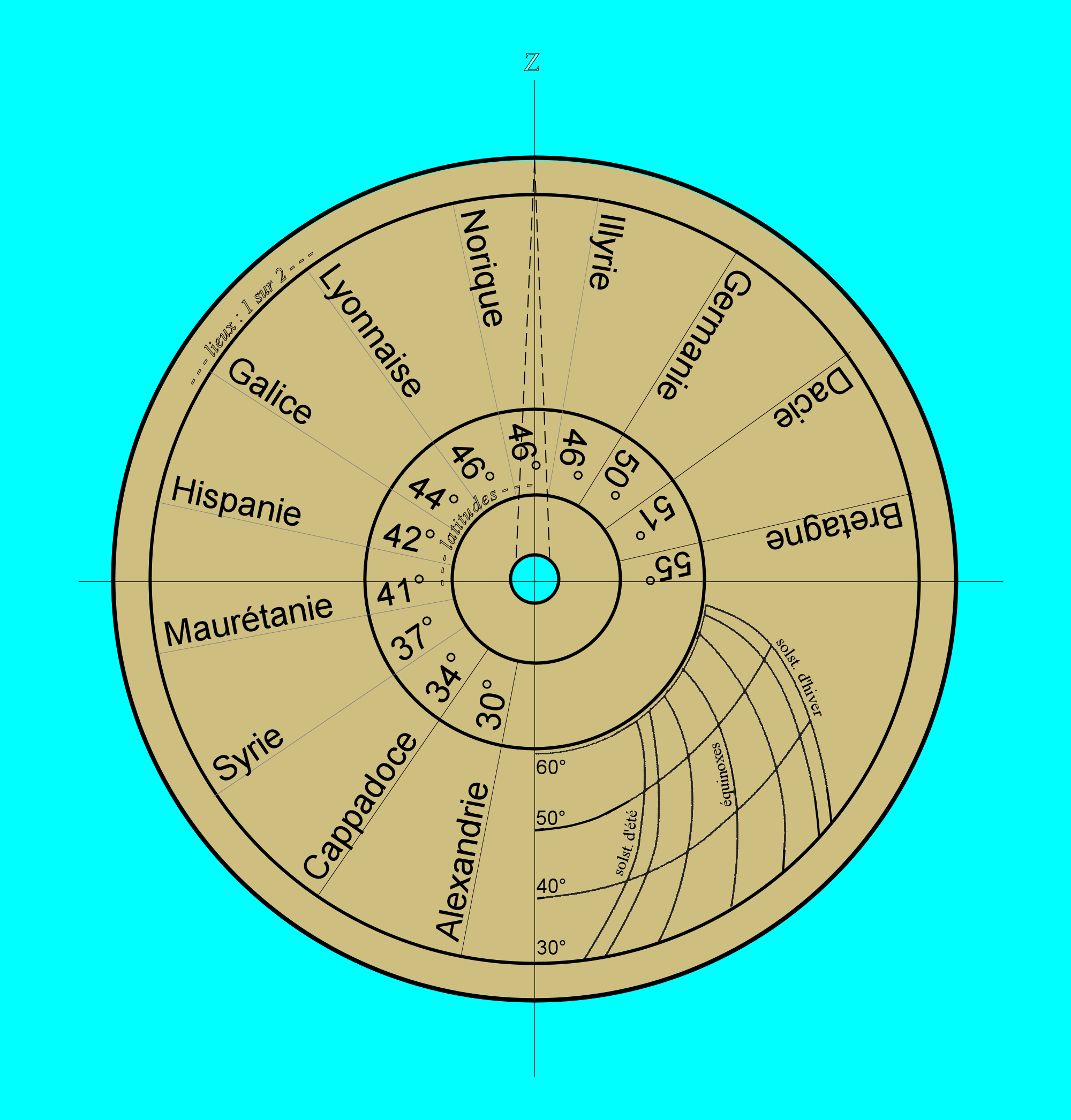 Disque pour déterminer la latitude, transposition moderne et partielle, d'après Christine Hoët-Van Cauwenberghe.